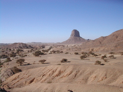 Sud de l'Algérie